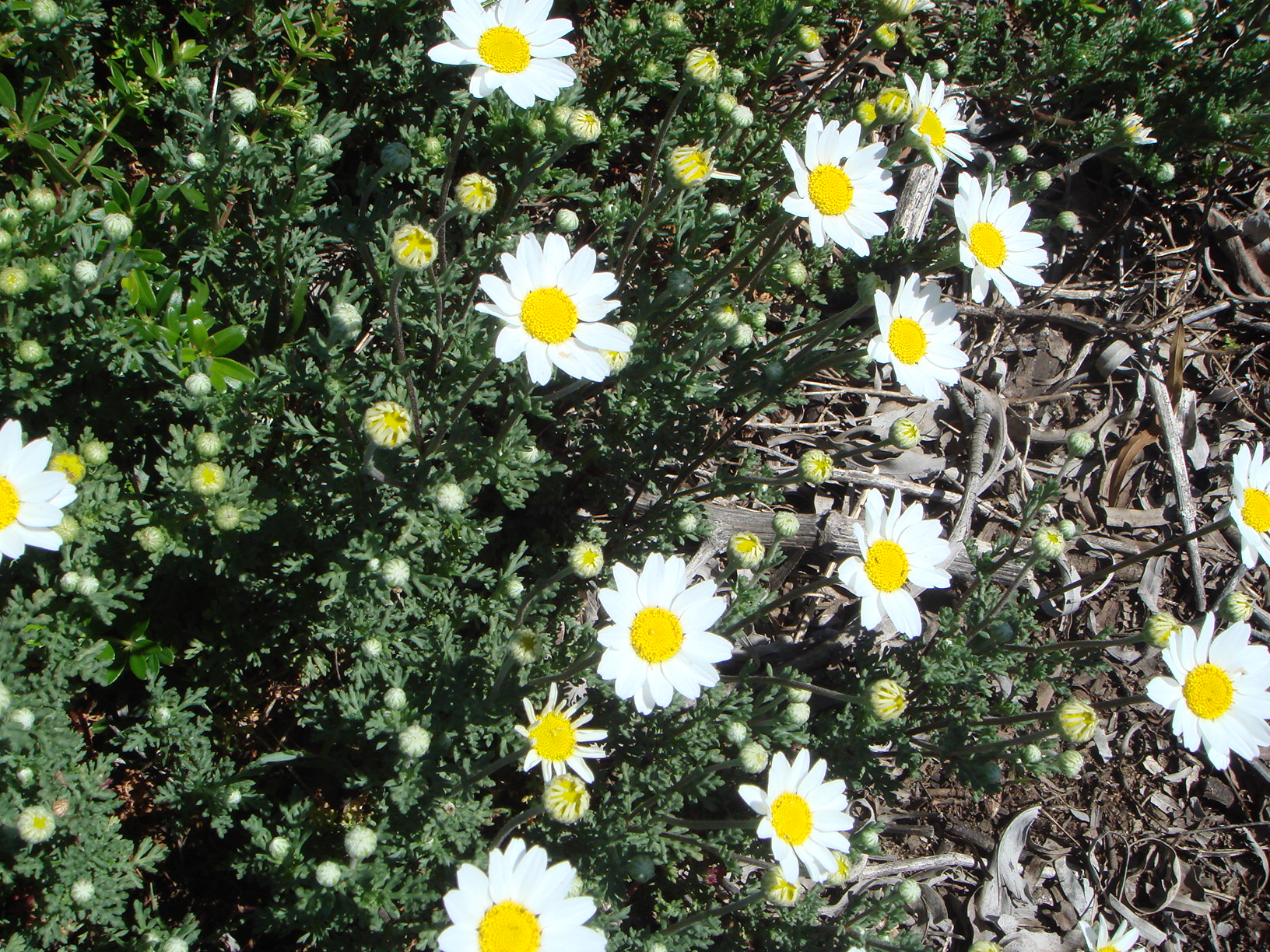 Anthemis maritima, Costa de Cádiz, España